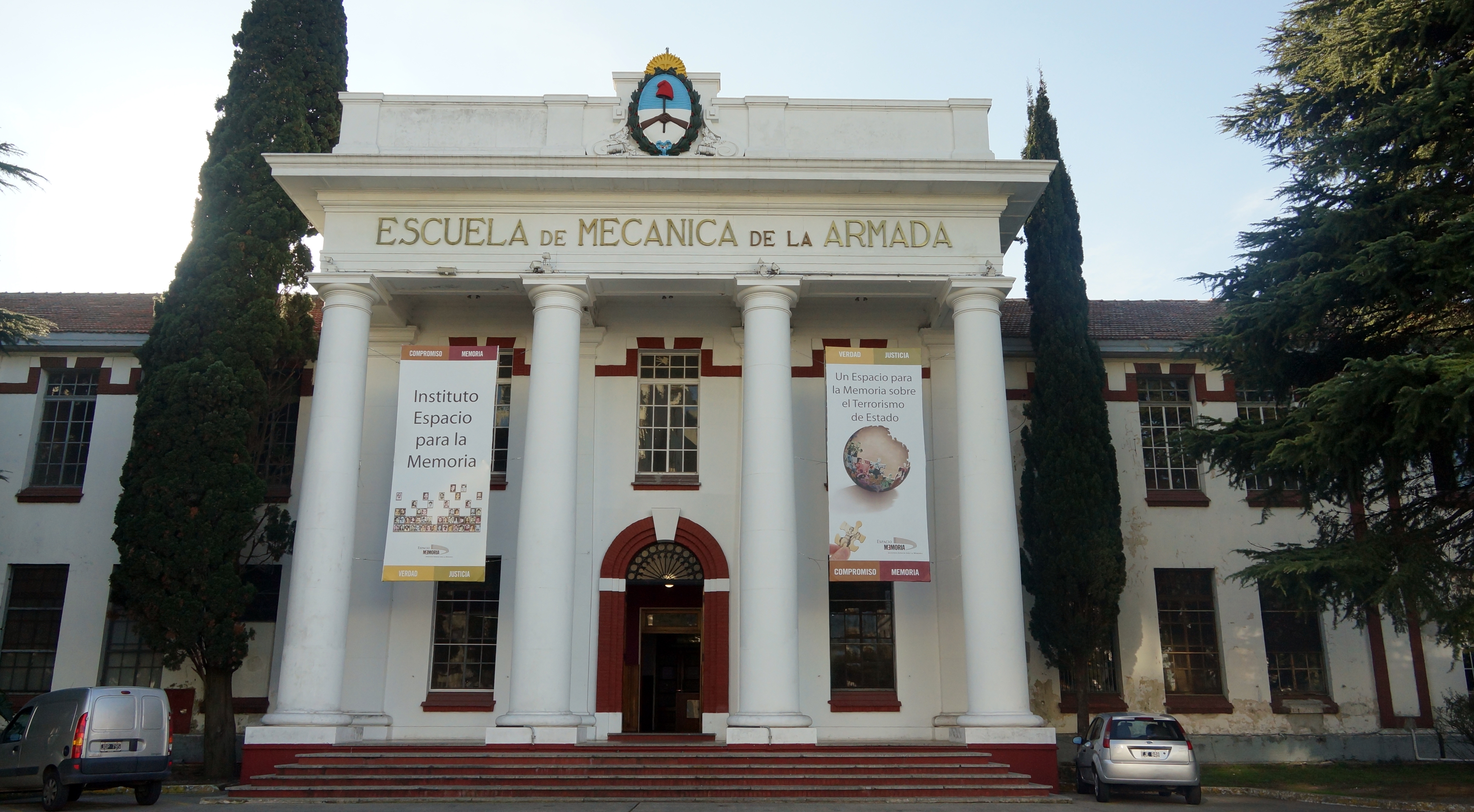 Escuela de Mecánica de la Armada, actual Espacio Memoria y Derechos Humanos.